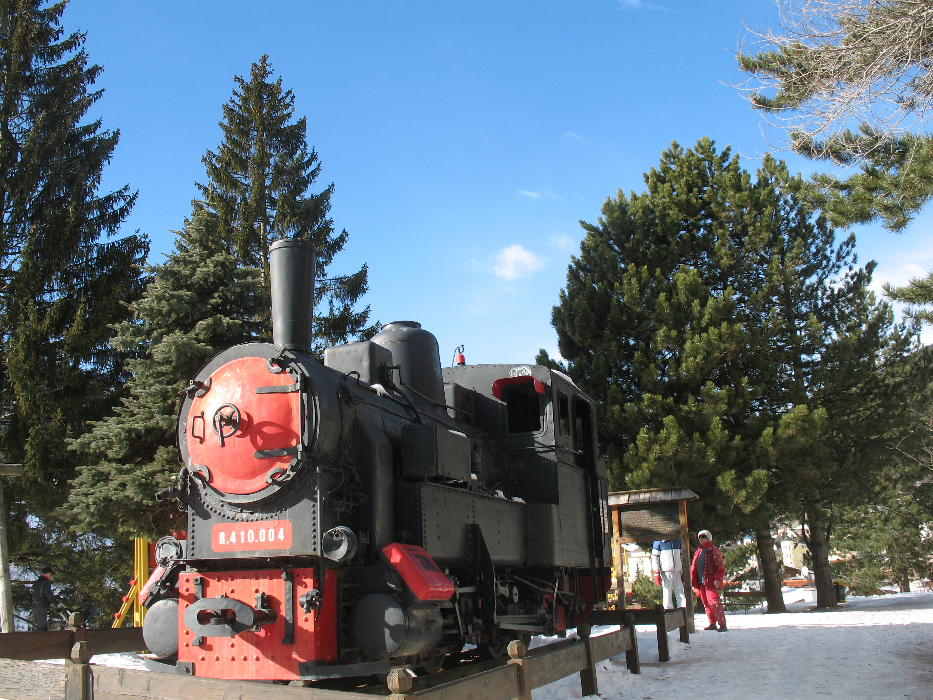 vecchia locomotiva del treno della val Gardena